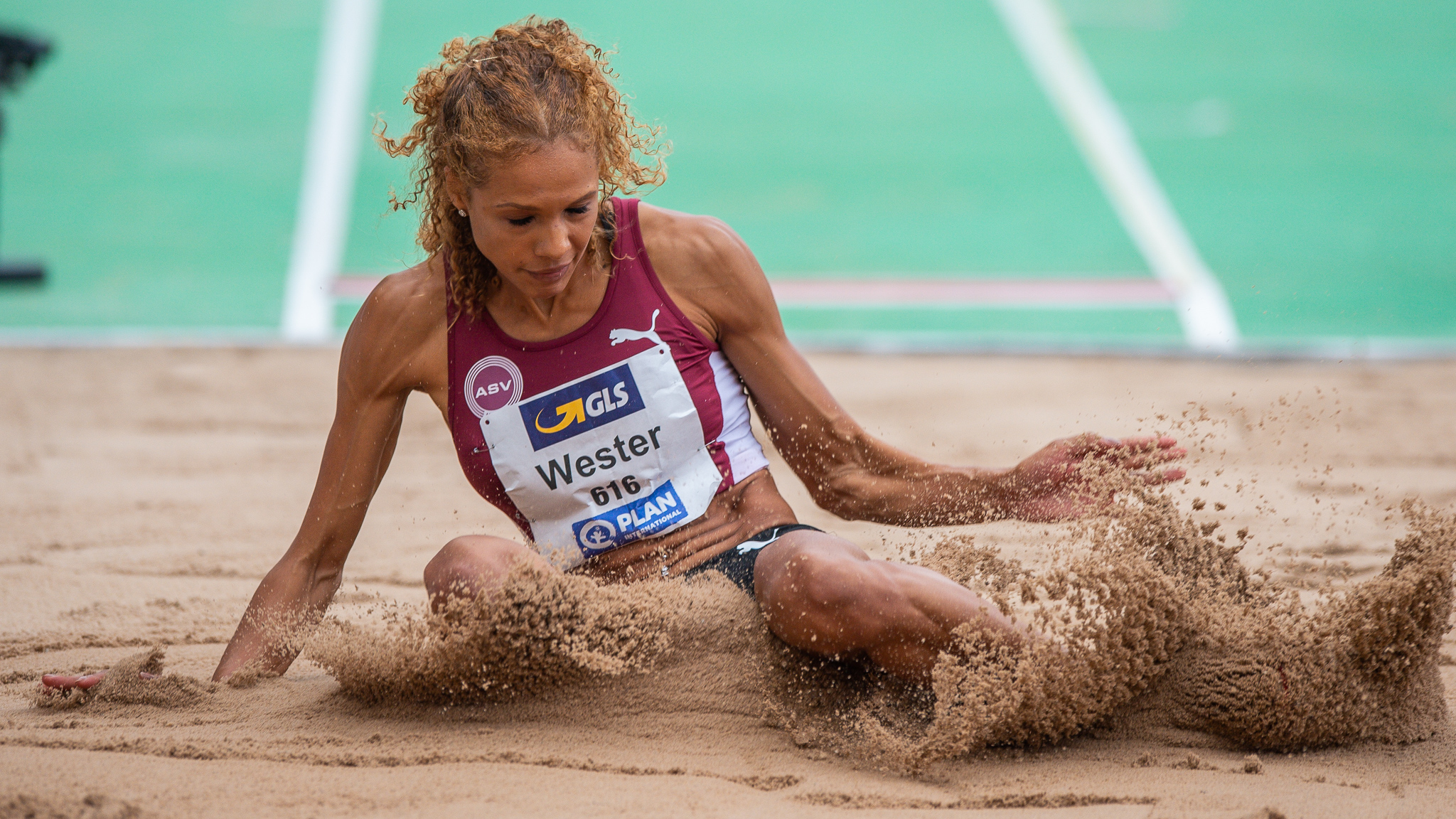 ASV Köln,Alexandra Wester,DLV,Deutsche Leichtathletik Meisterschaften 2018,Deutscher Leichtathletik-Verband,Long jump,Max-Morlock-Stadion,Weitsprung